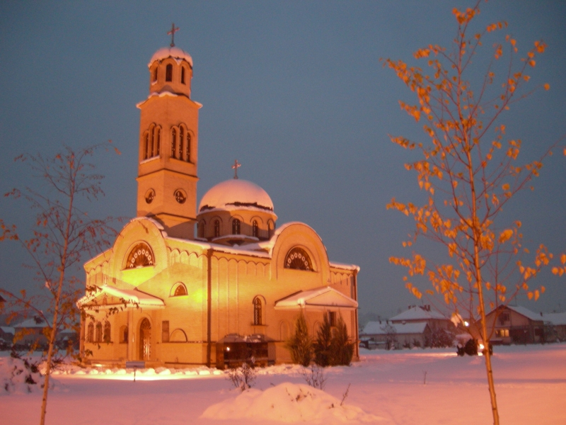 Crkva Svete Petke Paraskeve u Ugljeviku